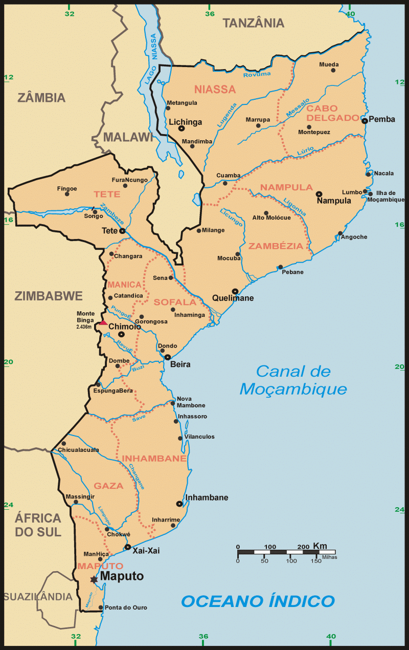 Map of Mozambique